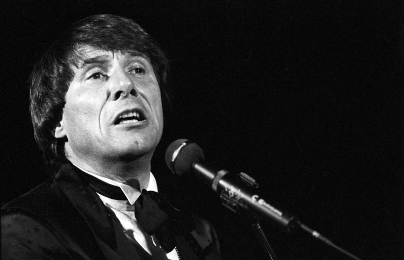 Berlin, Friedrichstadtpalast, Udo Jürgens ADN-ZB / Heinrich / 2.3.87 / Berlin: Jubiläum. Mit dem österreichischen Sänger und Komponisten Udo Jürgens gab im Friedrichstadtpalast Berlin ein Entertainer von Weltrang sein Gastspiel zum Jubiläum der Stadt. In den von poetischen Texten getragenen Liedern des neuen Programms "Deinetwegen" schwangen sehr persönliche Erfahrungen des 1934 in Klagenfurt geborenen Künstlers mit. Abgebildete Personen: Jürgens, Udo: Schlagersänger, Österreich (GND 118558641)